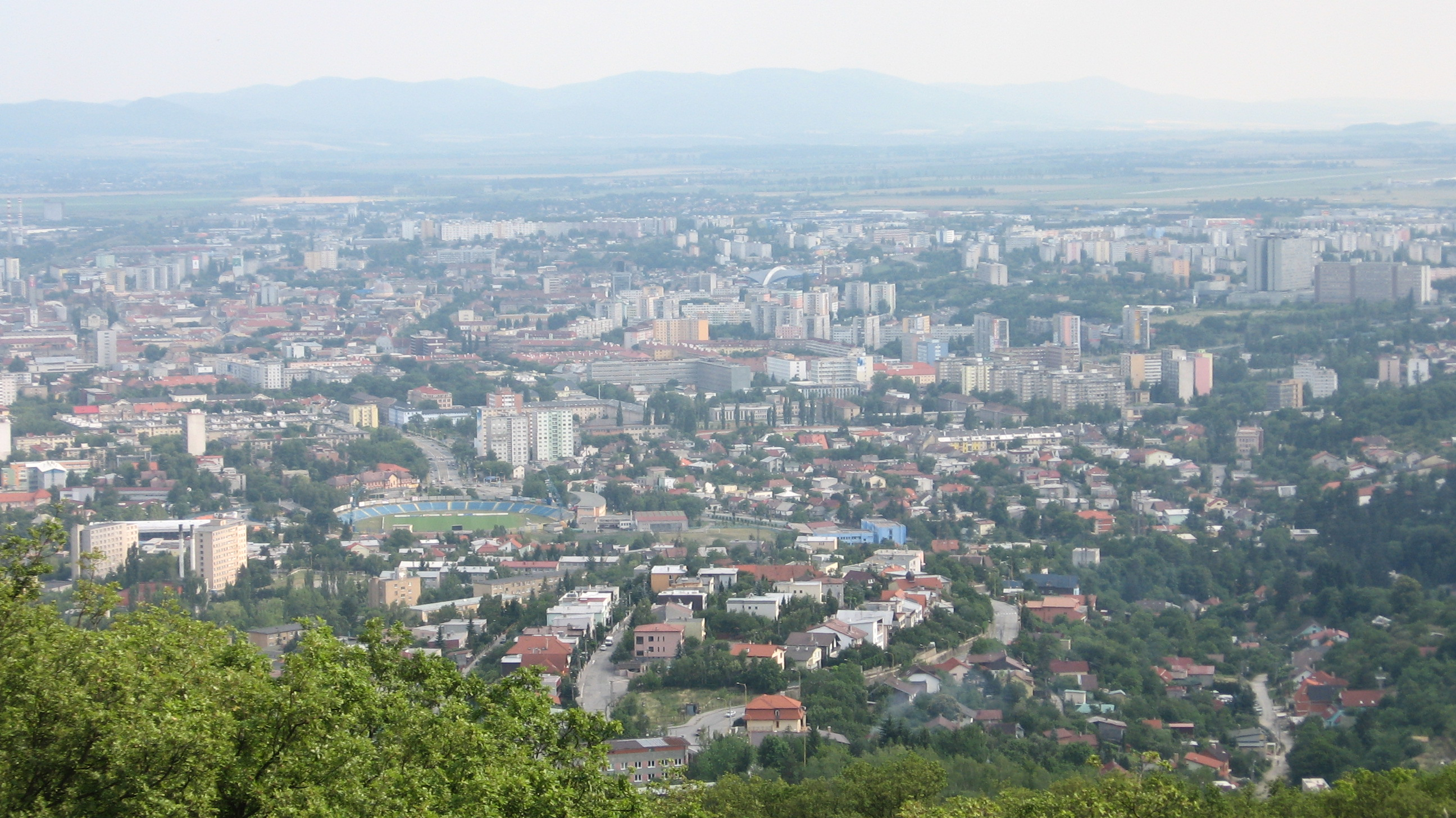 Košicen keskustaa kesällä 2007.